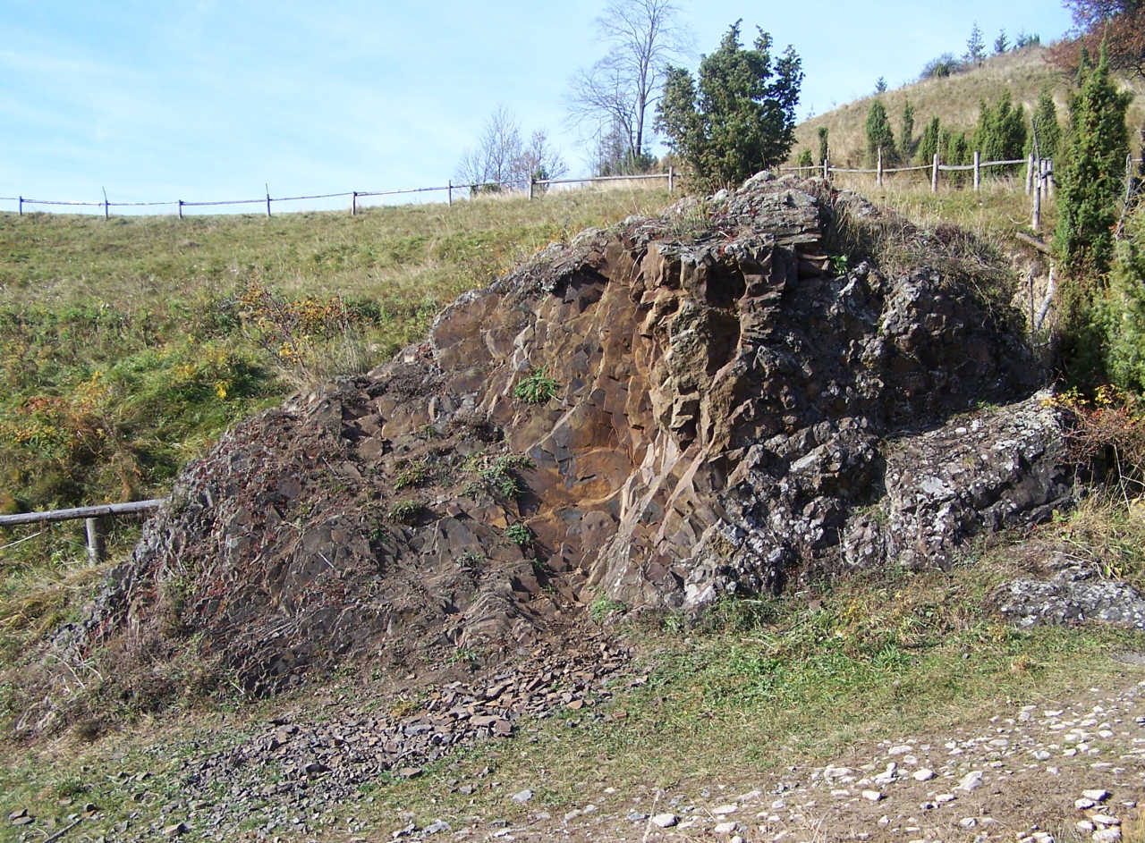 Bazaltowa Skałka (Pieniny. Biała Woda)